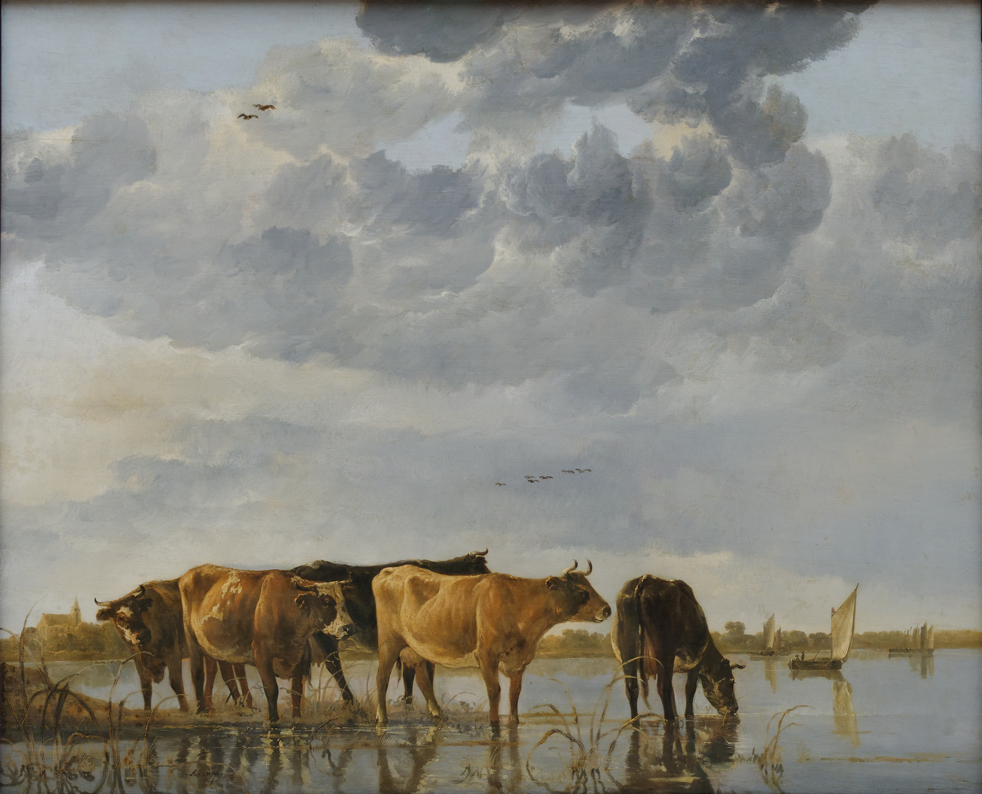 Cattle in a Riverlabel QS:Len,"Cattle in a River" label QS:Lfr,"Bovins dans la rivière"